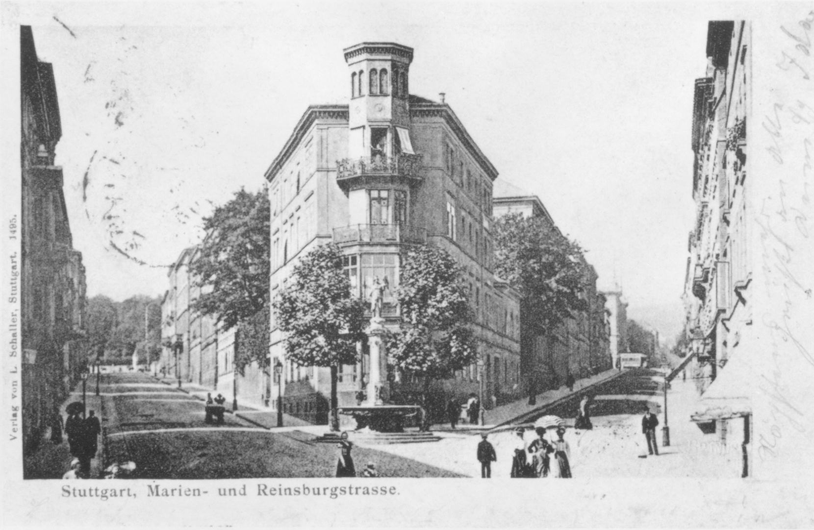 Stuttgardia-Brunnen mit einer Stuttgardia-Figur des Bildhauers Ernst Rau, Guss von Wilhelm Pelargus, 1864. Der Brunnen bildete den Abschluss der spitzen Ecke zwischen Reinsburgstraße und Marienstraße. Im Zweiten Weltkrieg wurde er zerstört, heute (2017) befindet sich an dieser Stelle eine ehemalige Tankstelle mit einem Autopflegebetrieb.